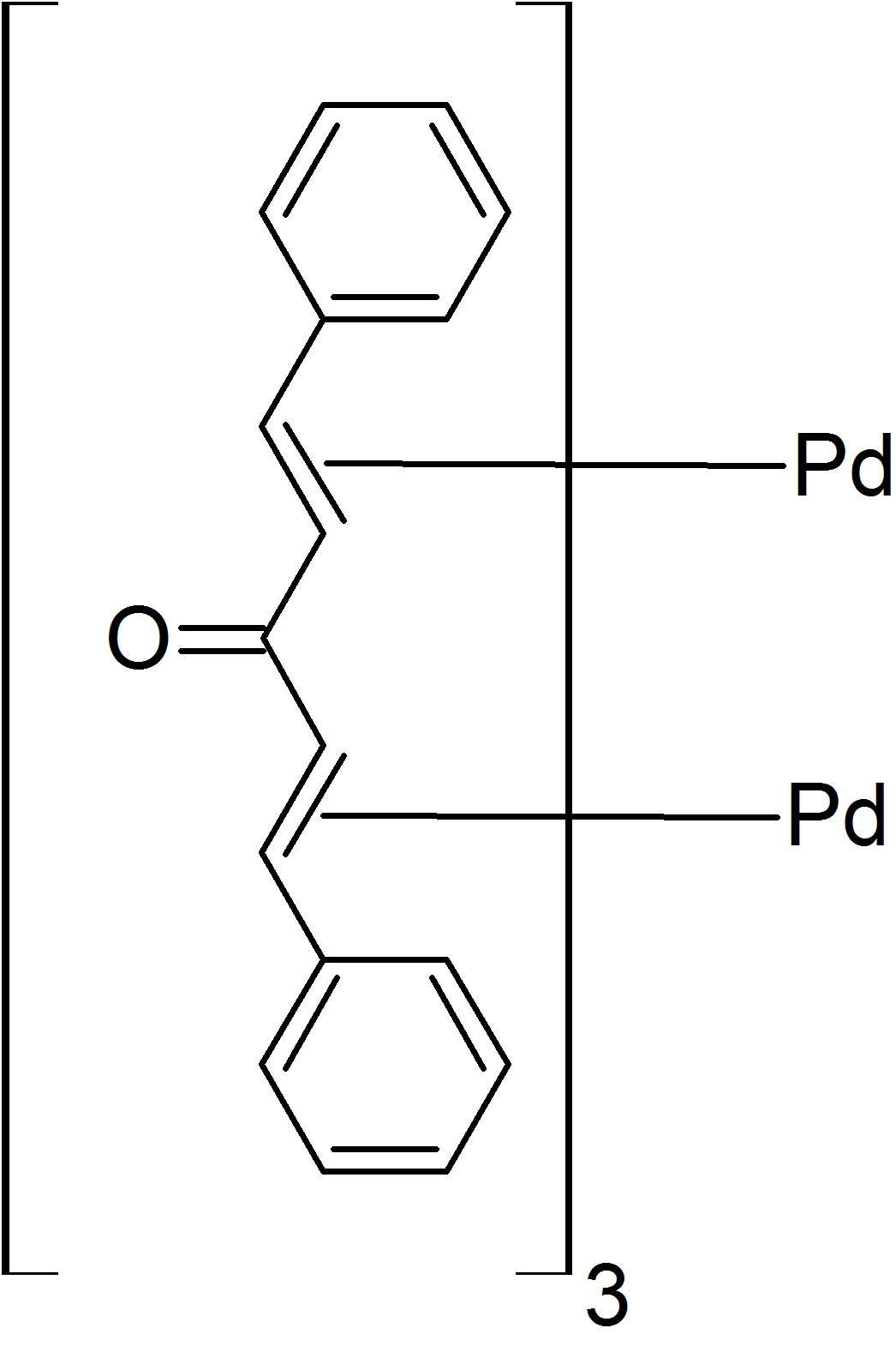 Tris(dibenzylideneacetone)dipalladium